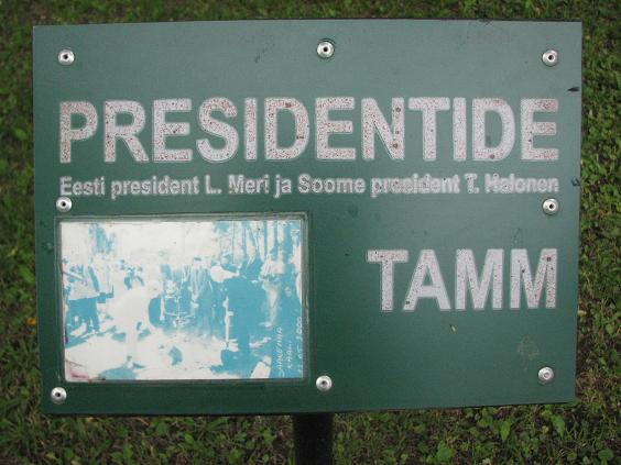 Presidentide tamme infotahvel